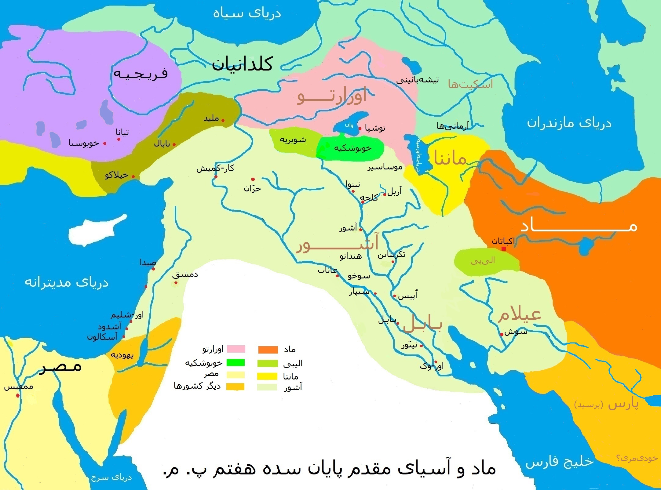 ماد و آسیای مقدم (قفقاز) در قرن نهم پیش از میلاد